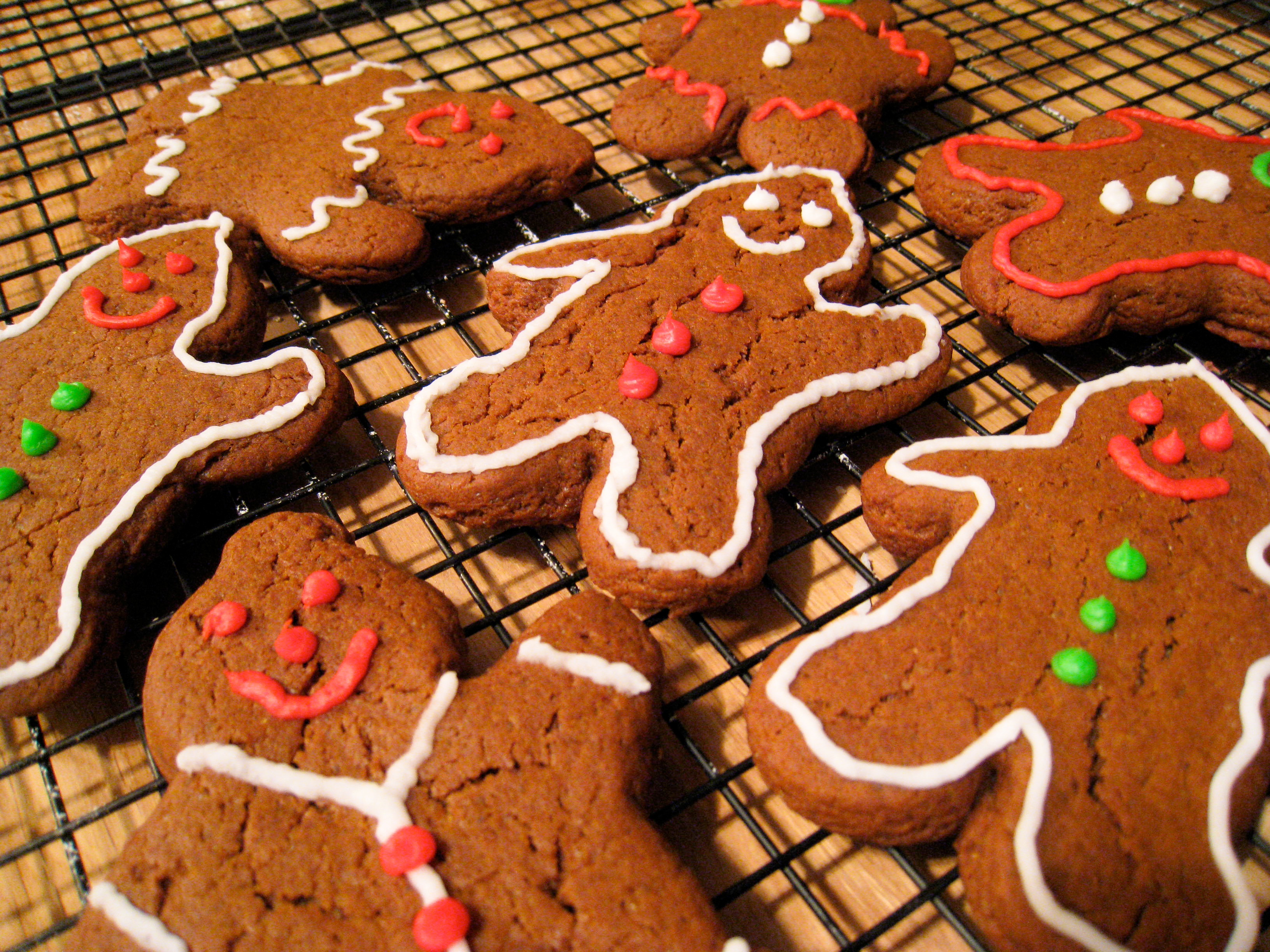 Vegan Gingerbread Men